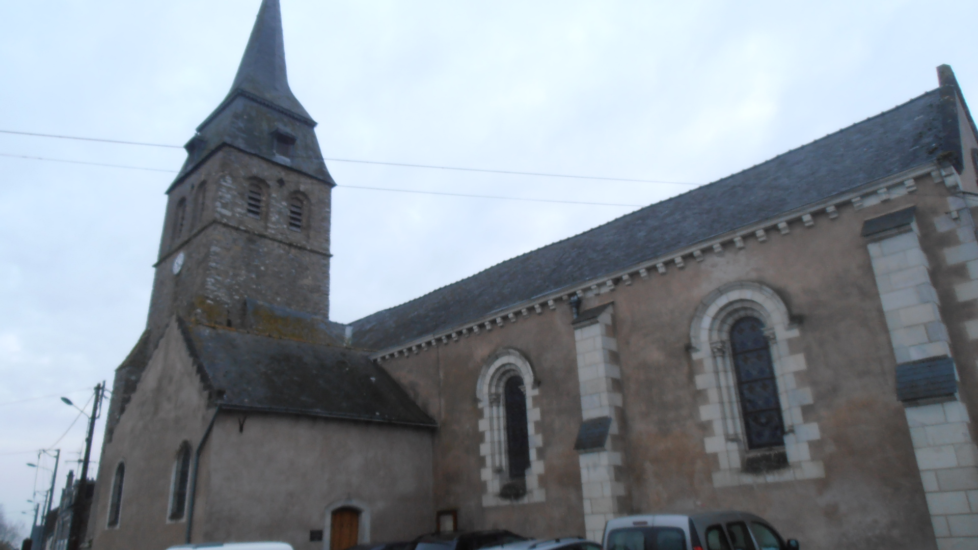 l'église de la commune de cherré (49)